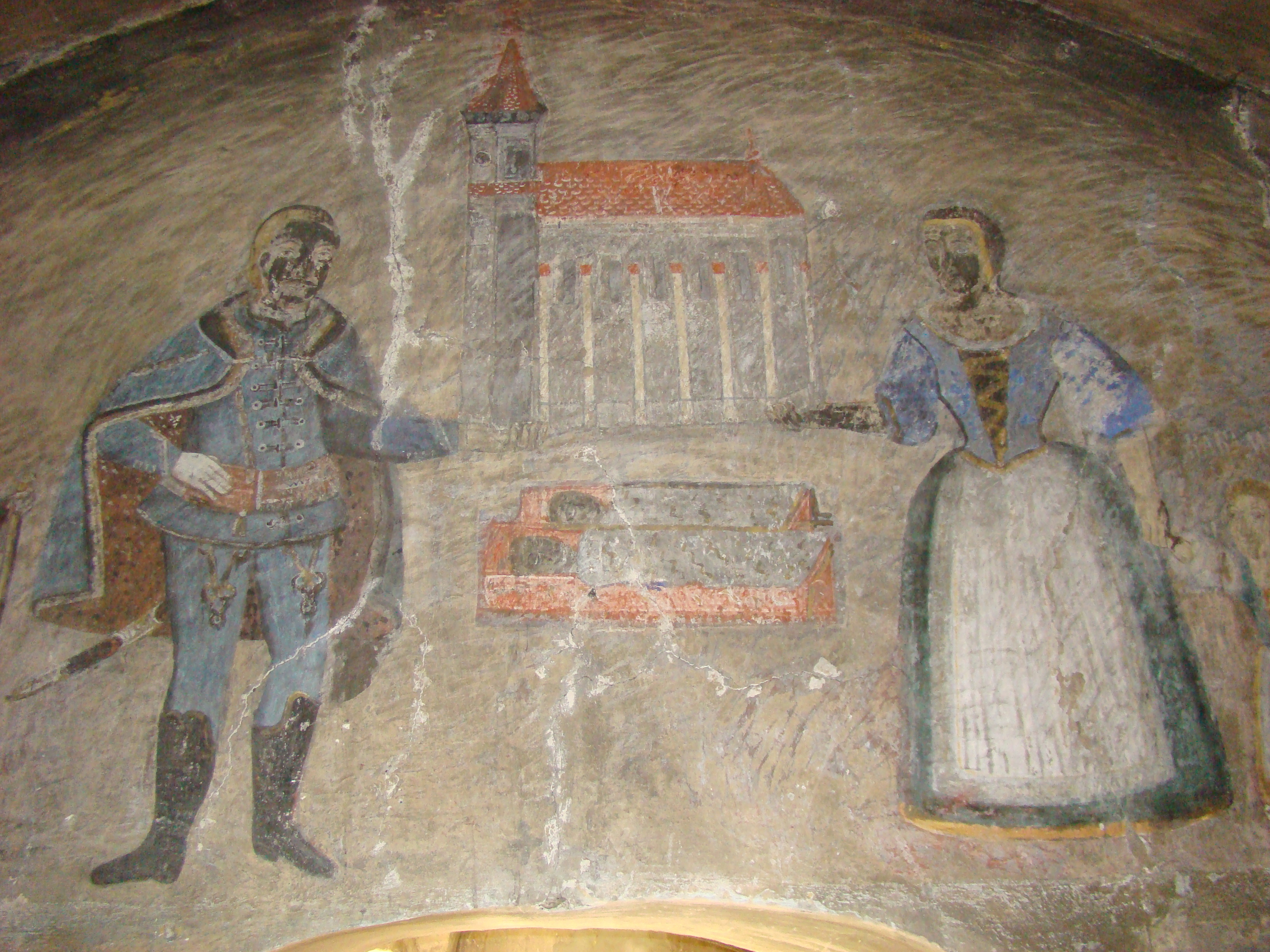 Biserica "Buna Vestire", sat ROŞCANI; comuna DOBRA